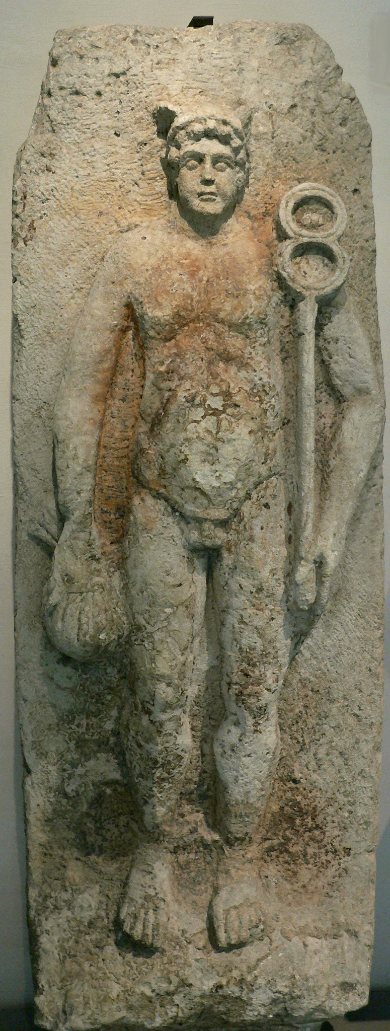 Stèle de Mercure Stèle de Mercure au grand caducée, calcaire, Époque gallo-romaine, lieu de découverte: Hôtel-Dieu, 1867 Musée Carnavalet Photographe: Clio20